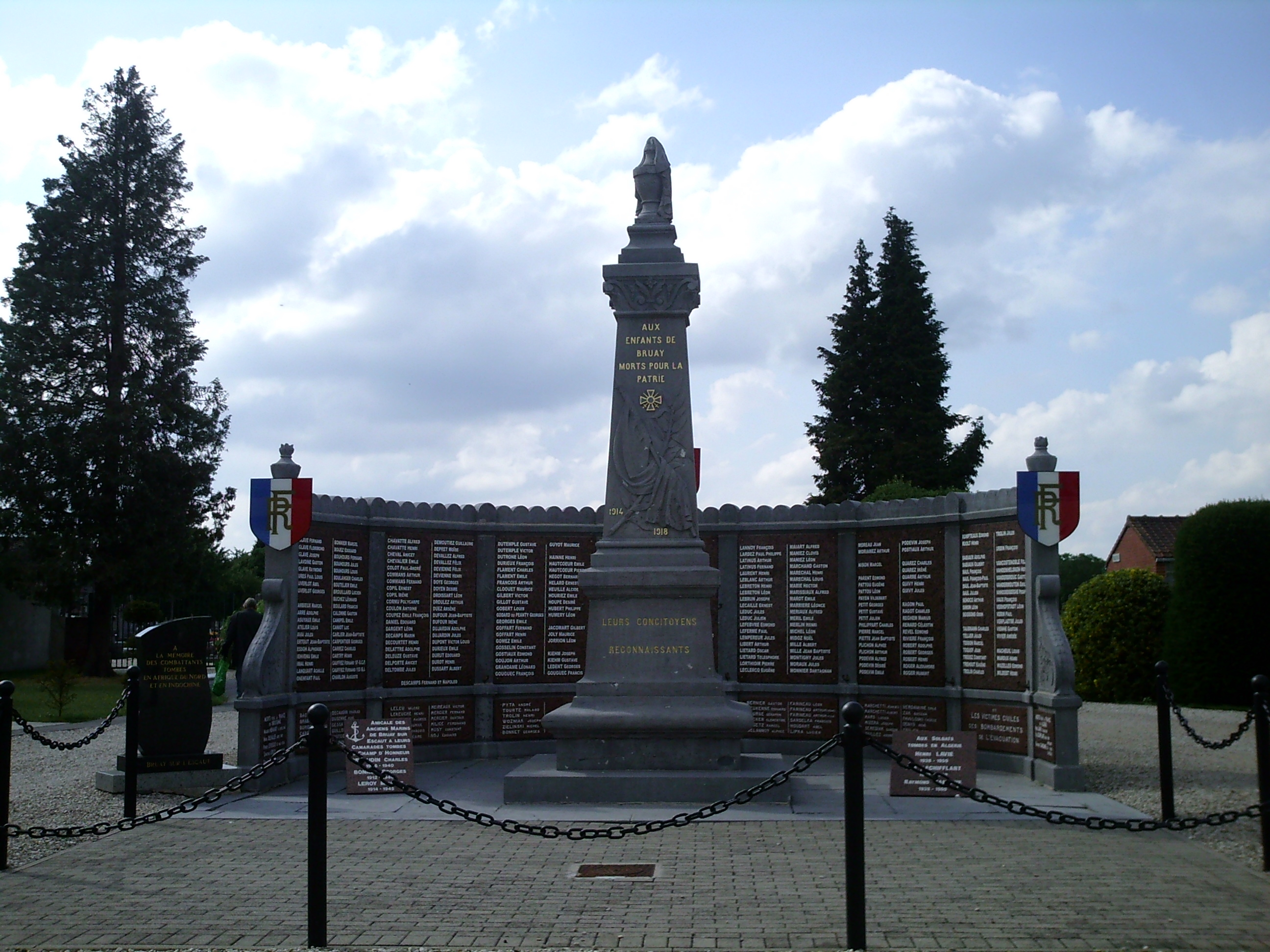 Monument aux morts commune de Bruay sur l'Escaut dans les Hauts de France